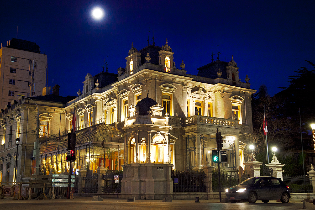 Palacio Sara Braun Ubicado a un costado de la plaza de armas Muñoz Gamero de la ciudad de Punta Arenas, Chile. This is a photo of a national monument in Chile: 1215